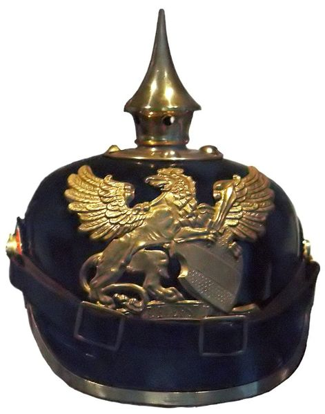 Badische Infanterie-Pickelhaube für Mannschaften, im Landesmuseum Karlsruhe fotografiert. Die Fotoerlaubnis wurde an der Kasse gegeben.